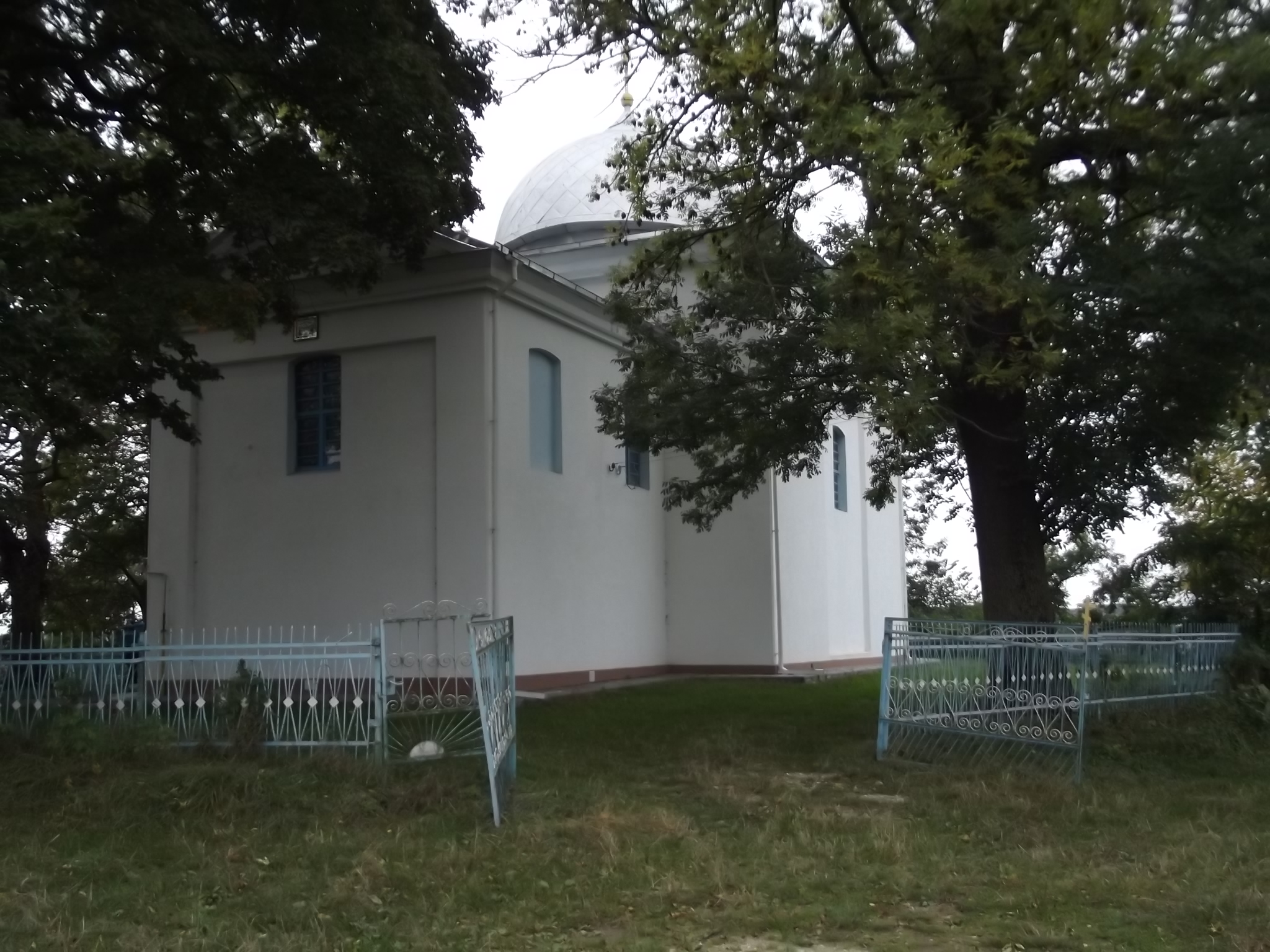 Свято-Троїцька церква (в стар. Михайлівська церква (мур.)), Селець